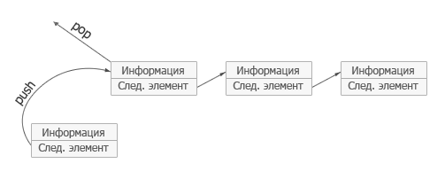 Иллюстрация организации стека